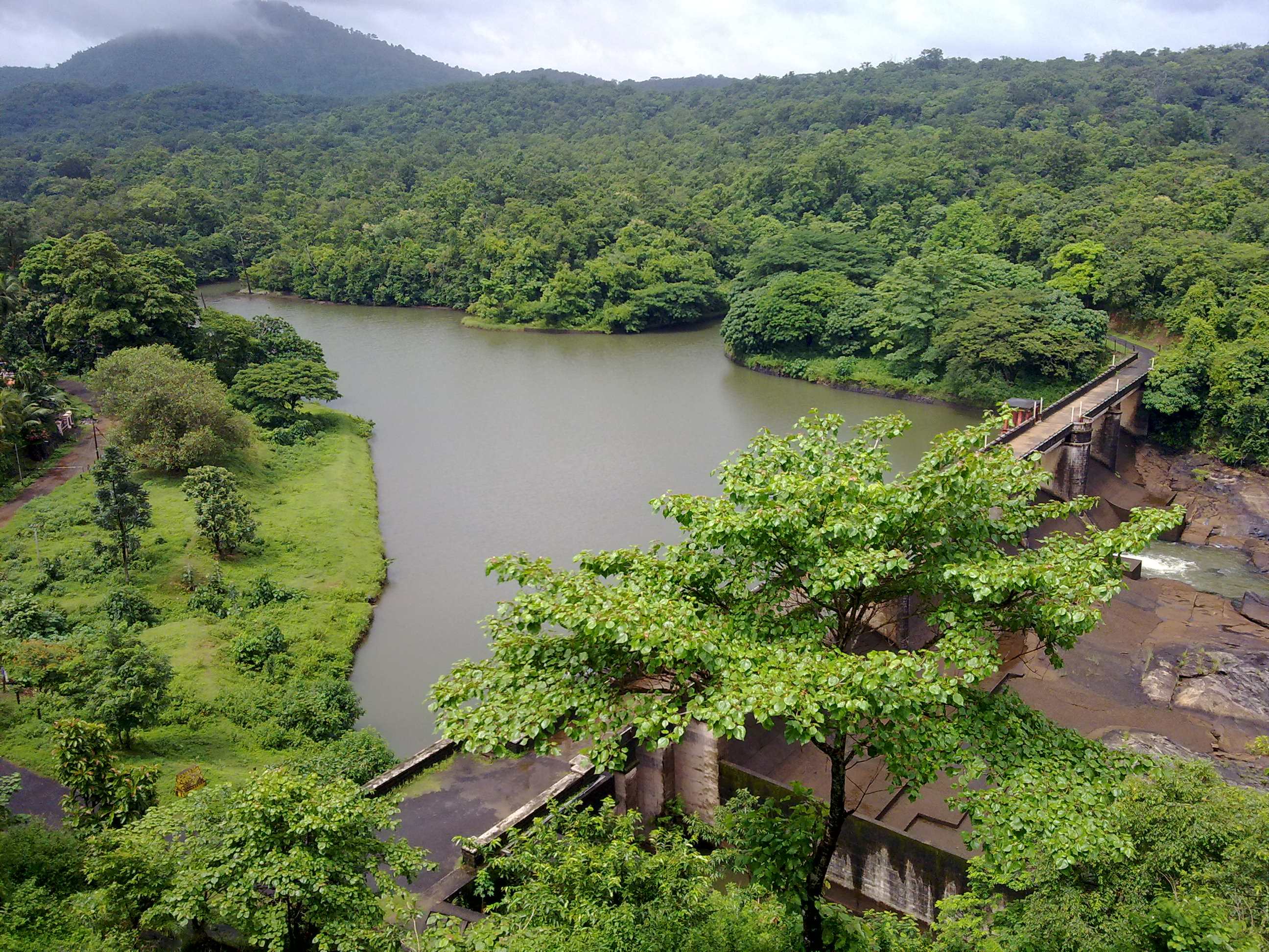 ഒറ്റയ്കൽ ലുക്ക് ഔട്ട്